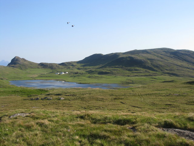 Loch Grigadale